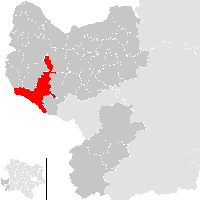 Bezirk Amstetten